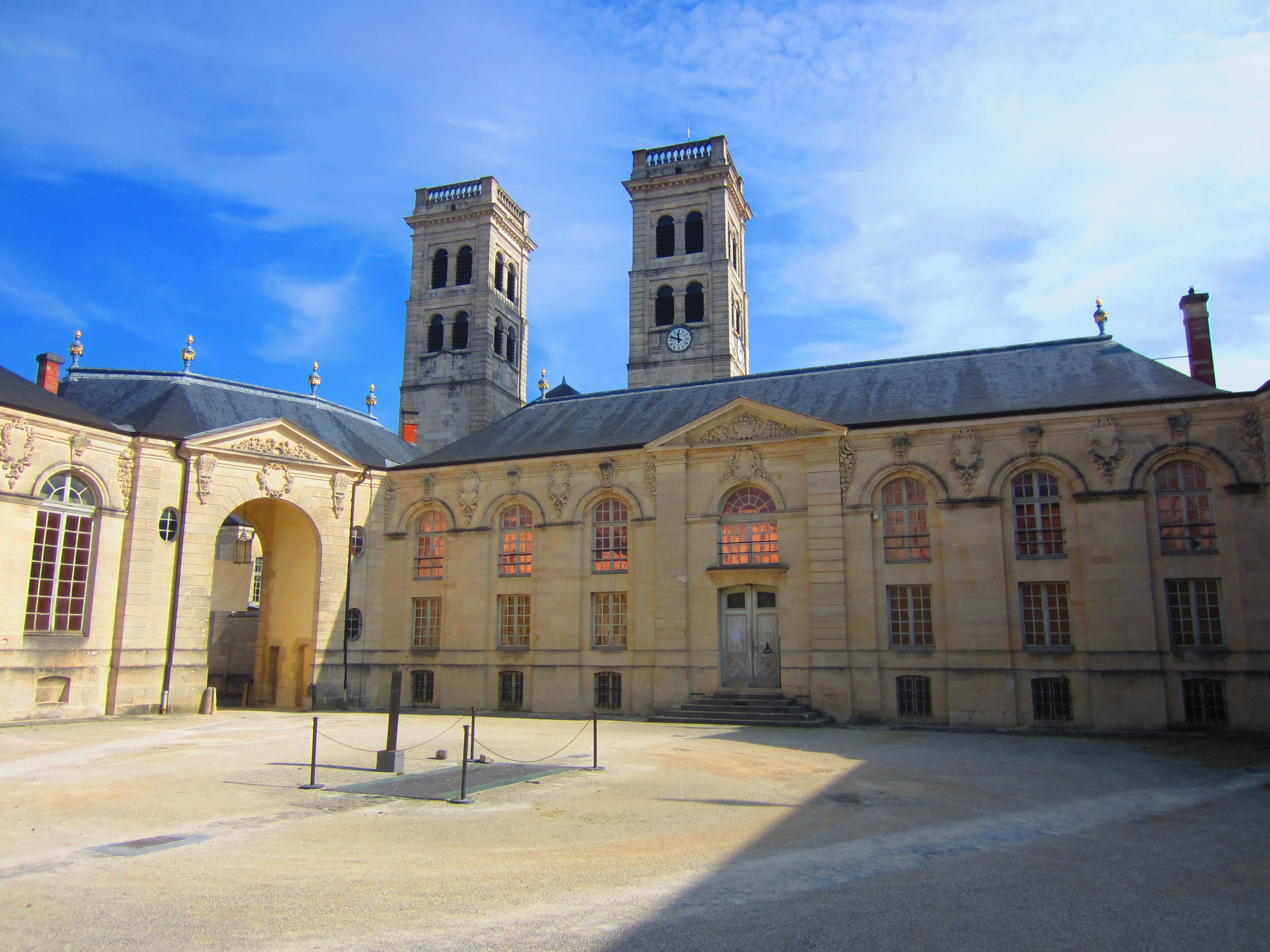 Cathedrale Verdun